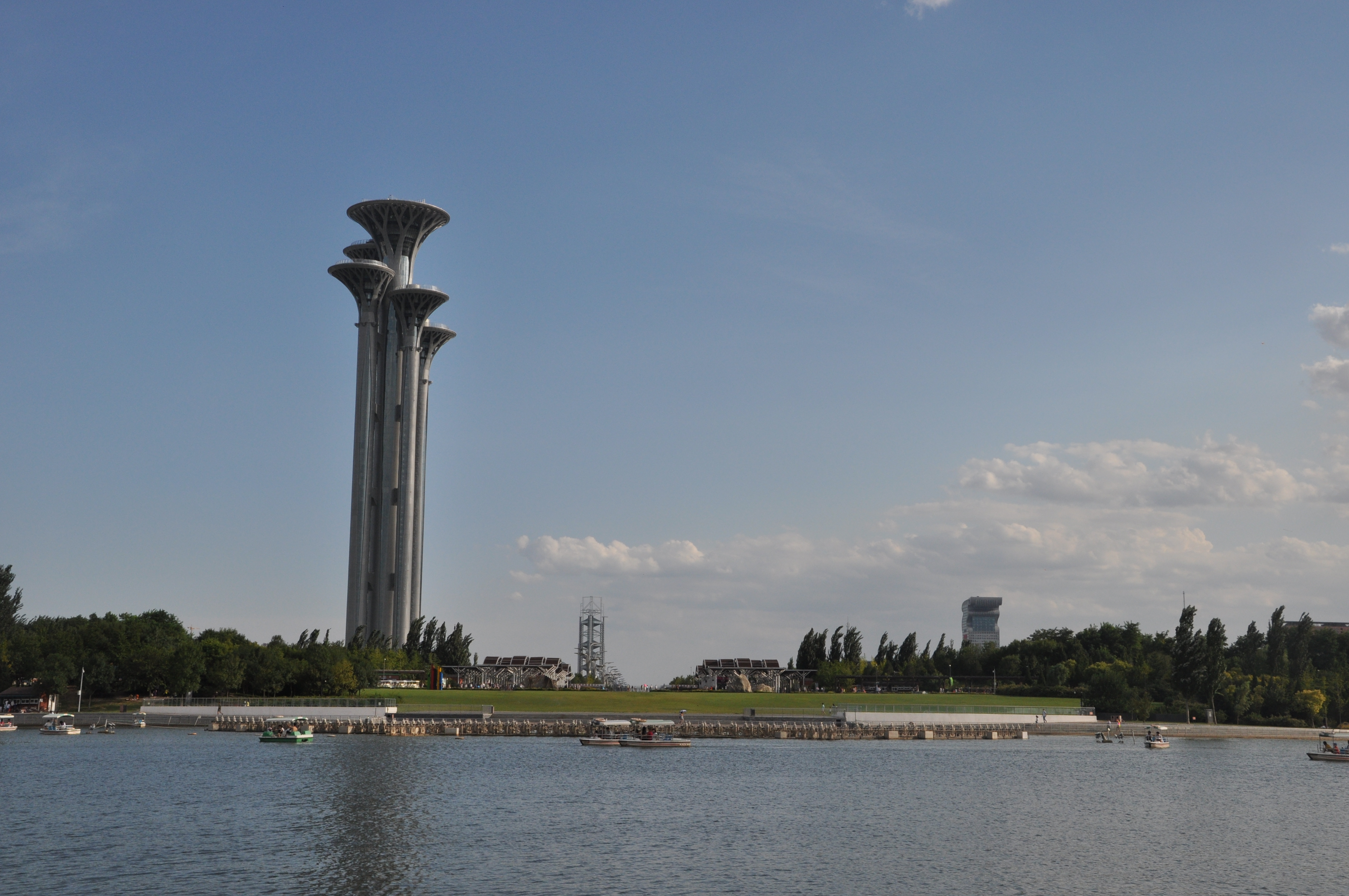 从北京奥林匹克森林公园奥海中部的平台上，顺中轴线向南拍摄，可见奥林匹克塔、玲珑塔、盘古大观等。